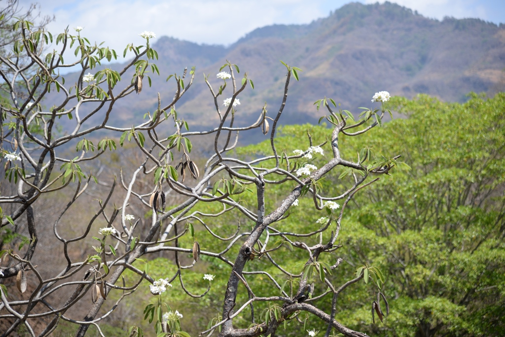 El árbol de Sacuanjoche en San Antonio, Achuapa, Nicaragua.